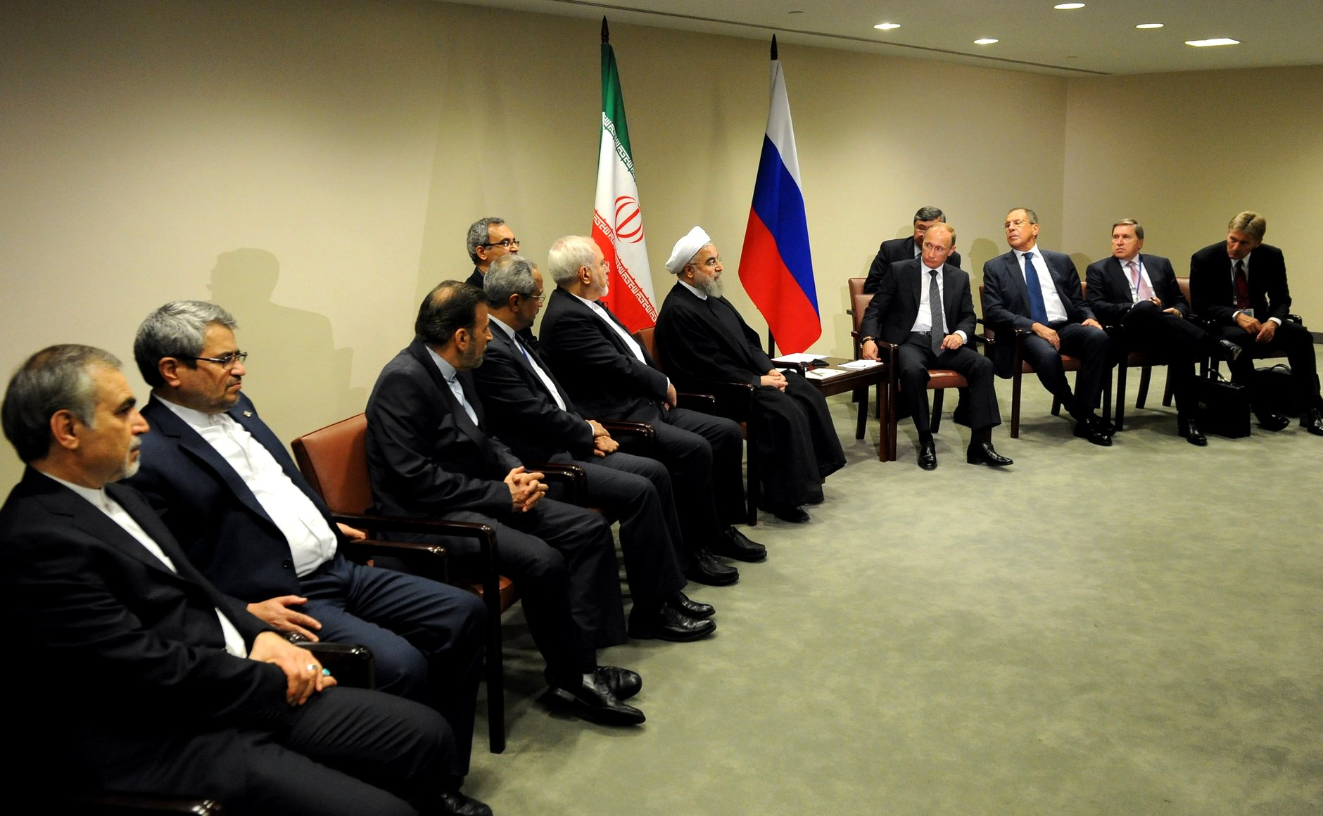 На полях сессии Генеральной Ассамблеи ООН Владимир Путин встретился с Президентом Исламской Республики Иран Хасаном Рухани.